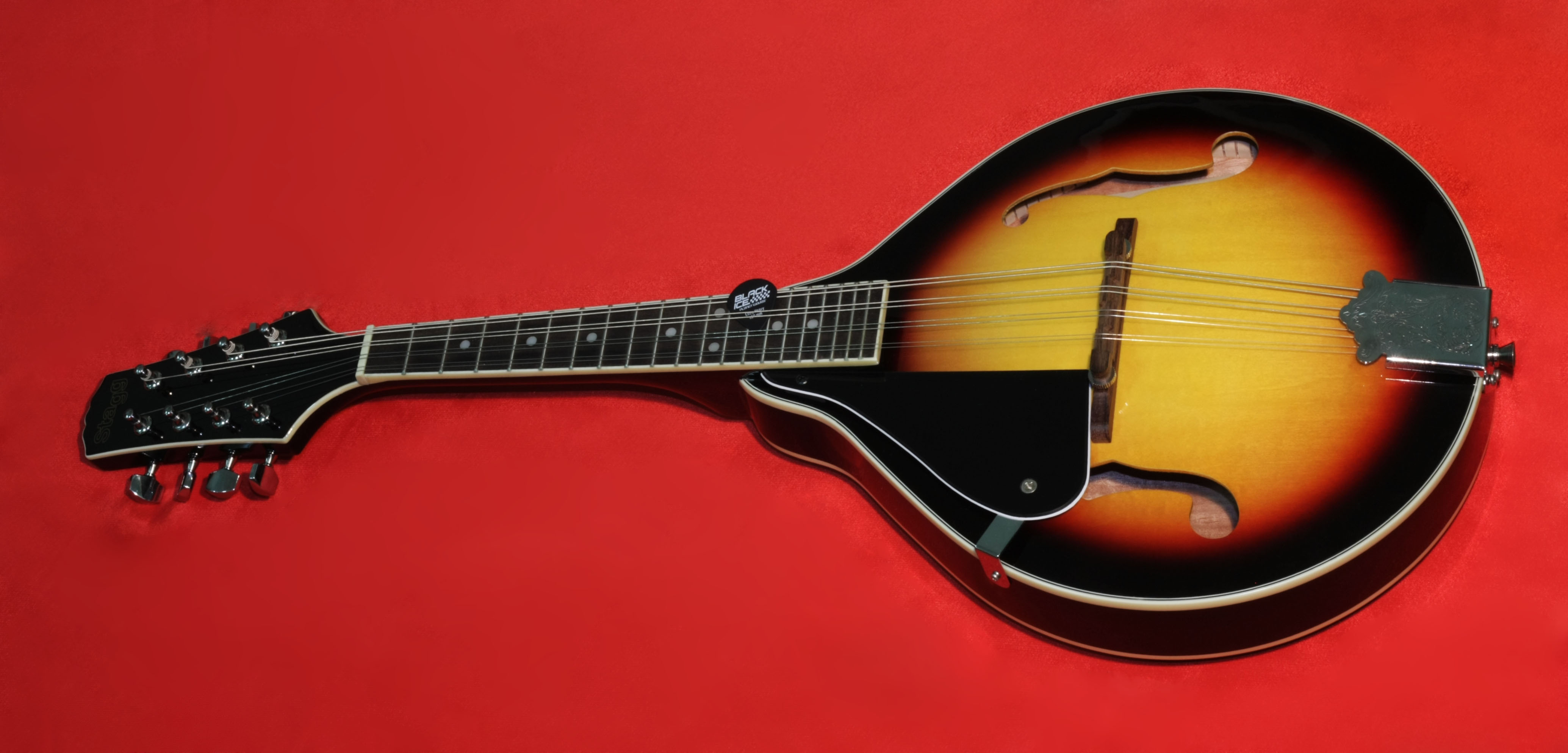 Mandolin